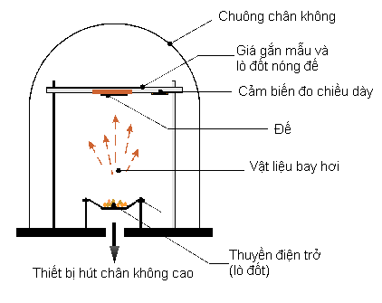 Sơ đồ nguyên lý hệ tạo màng mỏng bằng phương pháp bay bốc nhiệt đơn giản (Deshi)